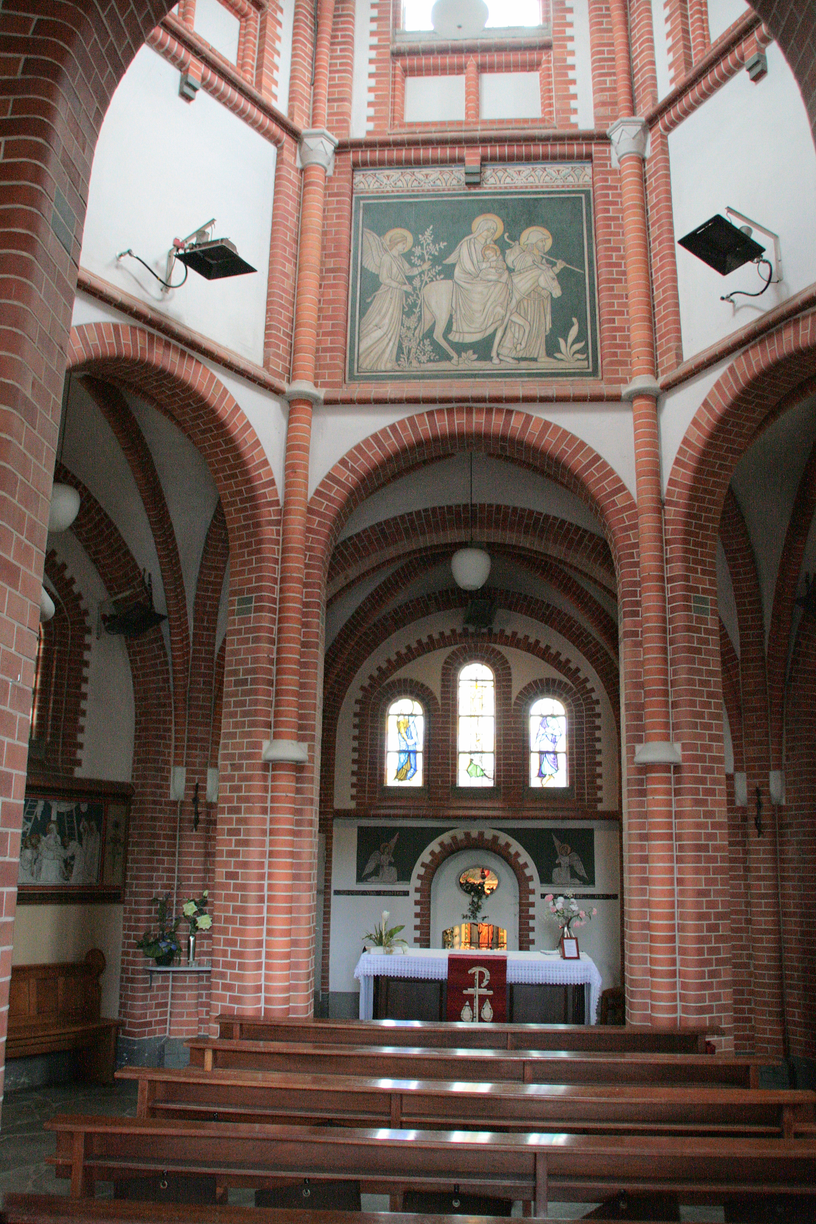 Het interieur bestaat uit een rondgang met zes rode bakstenen kolommen, die de verhoogde lantaarn dragen en waartussen zich rondboogvormige doorgangen bevinden. In de lantaarn zijn de rondboogvensters met glas-in-lood. Verder bevinden zich hier drie gevelschilderingen. In het uitgebouwde koor staat een eenvoudig houten altaar. De gevel achter het altaar heeft ook drie gekoppelde vensters, met figuratief glas-in-lood uit 1942. De vensteropeningen hebben rode bakstenen omlijstingen en hardstenen dorpels.